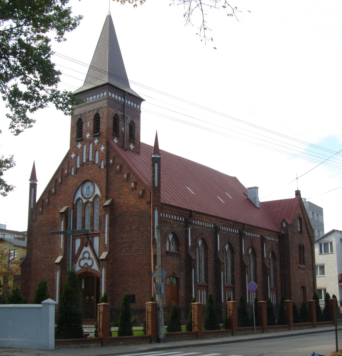 Mariavite Church (Oldcatholic) in Mińsk Mazowiecki / Kościół Starokatolicki Mariawitów w Mińsku Mazowieckim